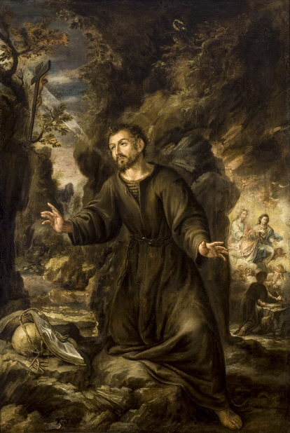 La obra representa a San Ignacio de Loyola, el fundador de la Compañía de Jesús, haciendo penitencia en la Cueva de Manresa.